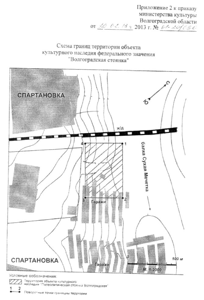 Схема границ ОКН